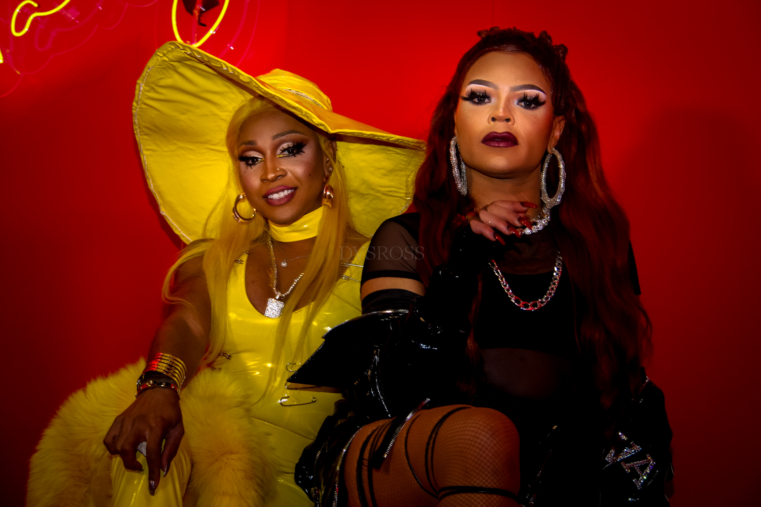 Rupaul DragCon 2019 - Los Angeles